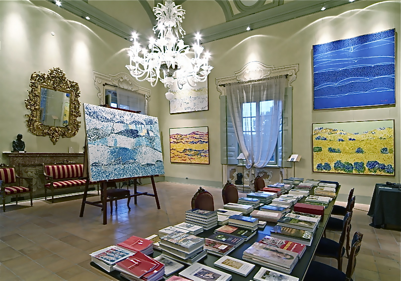 Una delle sale del museo di Villa San Carlo Borromeo a Senago (MI)